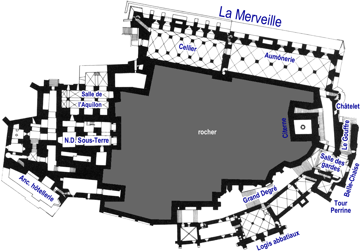 Mont Saint-Michel - Plan au niveau de la salle de l'Aquilon. Plan retouché et légendé par Utilisateur:Emdx d'après l'édition anastaltique de "Le Mont Saint-Michel"(1910) de Paul Gout (1852-1923).